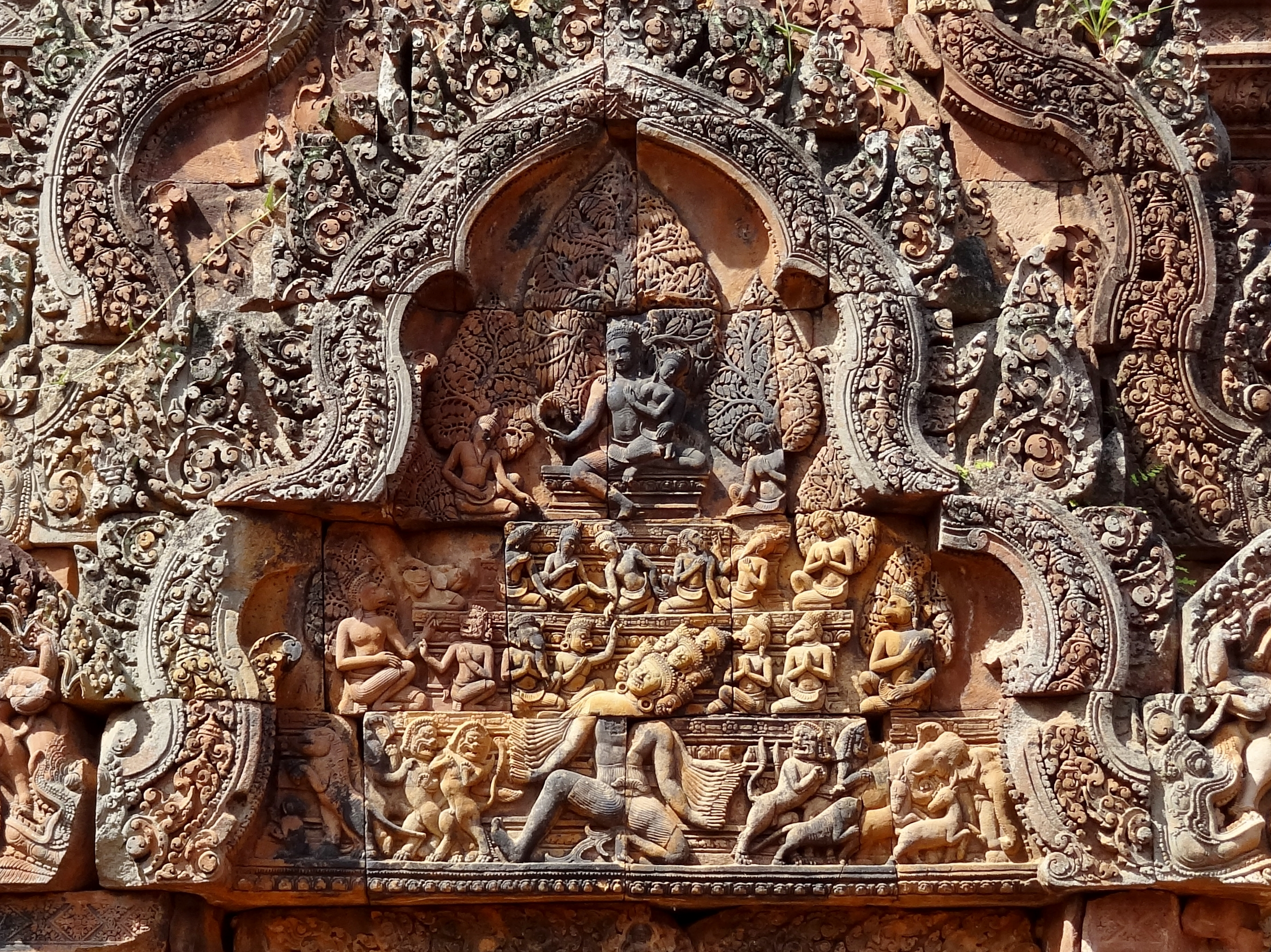 Der tausendköpfige Dämon Ravana schüttelt den Kailash, auf dem sich Shiva und Uma niedergelassen haben. Relief am östlichen Giebel der südlichen „Bibliothek“ der Banteay Srei (ប្រាសាទបន្ទាយស្រី ‚Zitadelle der Frauen‘), ursprünglich Tribhuvanamahesvara (‚Großer Gott der dreifaltigen Welt‘), Provinz Siem Reap, Kambodscha